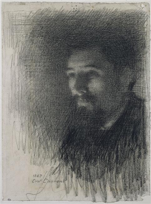 Portrait de Georges Seurat, dessin, 39x29 cm, Louvre, Paris